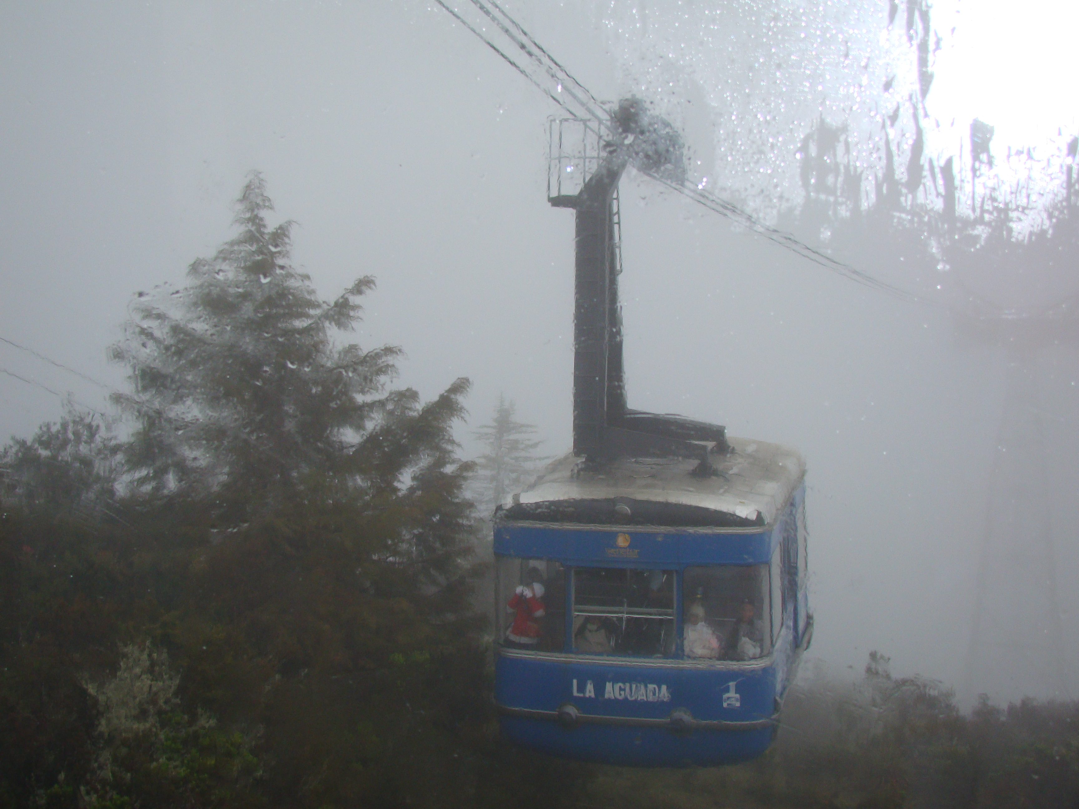 Mérida